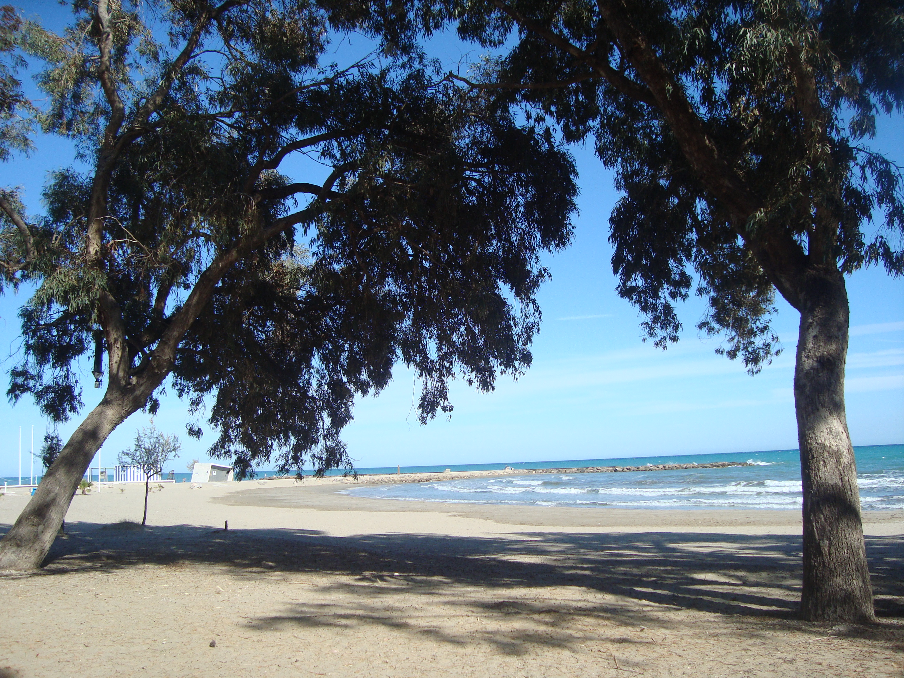 Platja de la Torre Sant Vicent (Benicàssim) This is a a photo of a beach in the Land of Valencia, Spain, with id: PL-1427